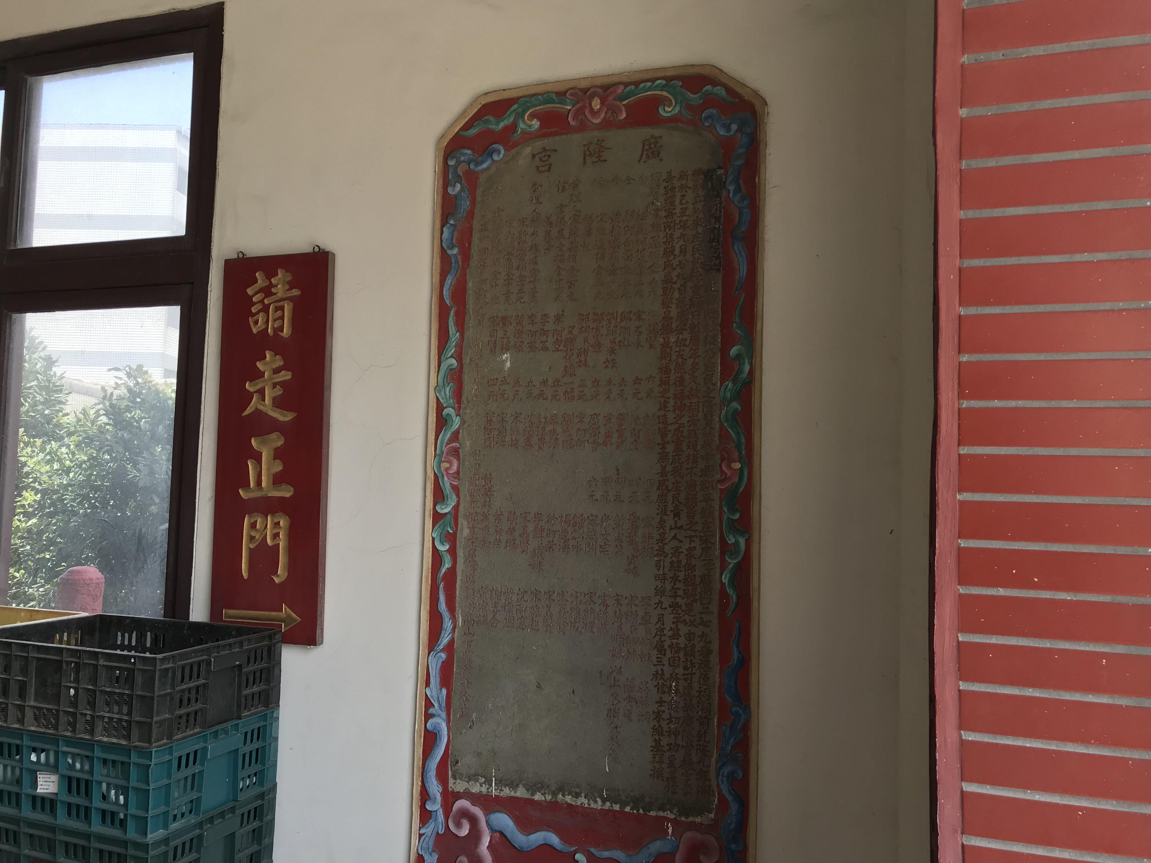 中文（台灣）: 平鎮廣隆宮募捐碑